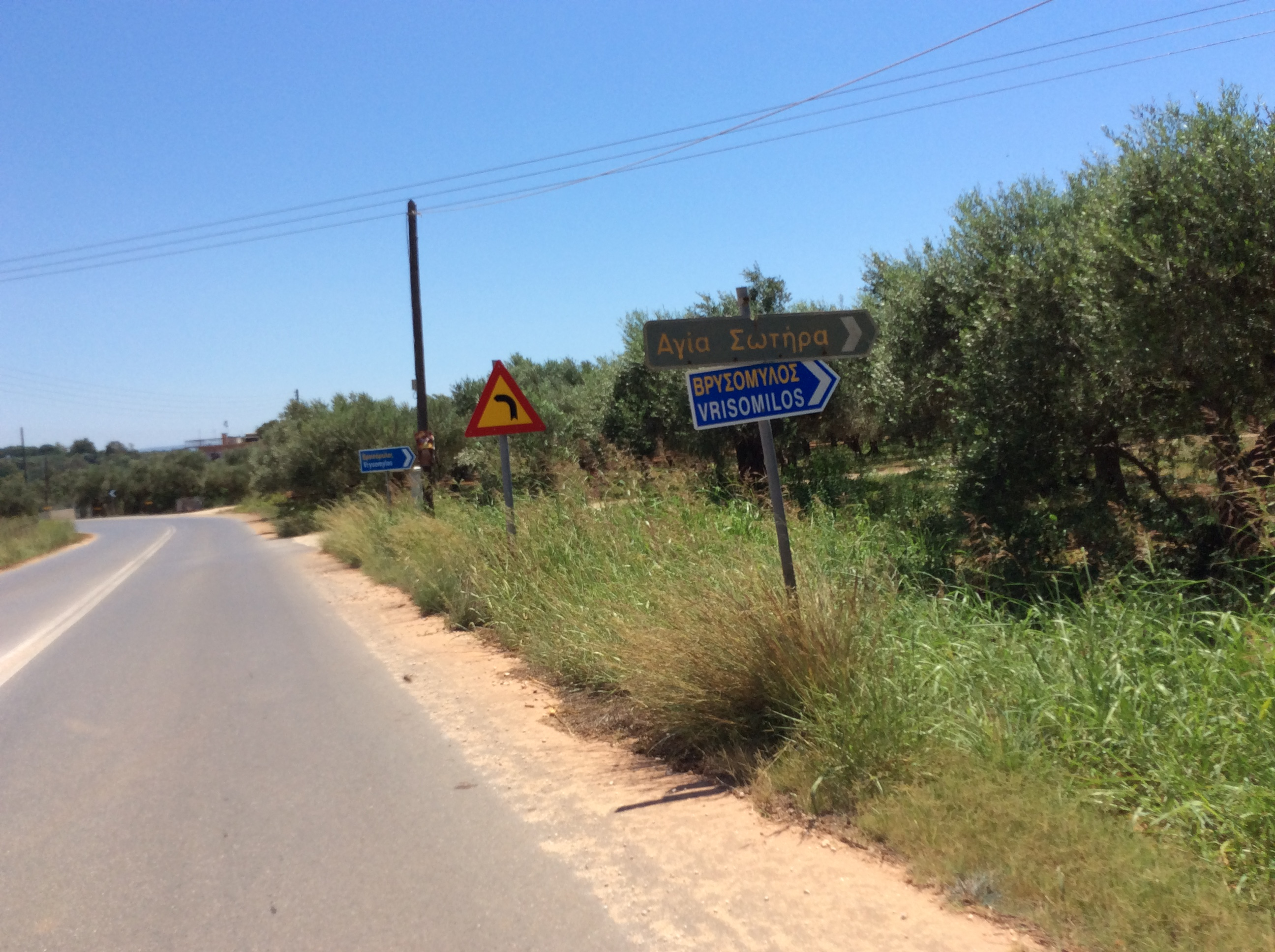 Βρυσόμυλος ή Αγία Σωτήρα Μεσσηνίας - Είσοδος προς τον οικισμό από την επαρχιακή οδό Μαραθόπολης - Πύλου.